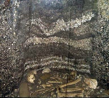 Sambaqui, acervo do Museu de Arqueologia e Etnologia da Universidade de São Paulo. Fotografia de Eliel Bragatti e Renata Martins Rocha, postadas na galeria do LiGEA USP.